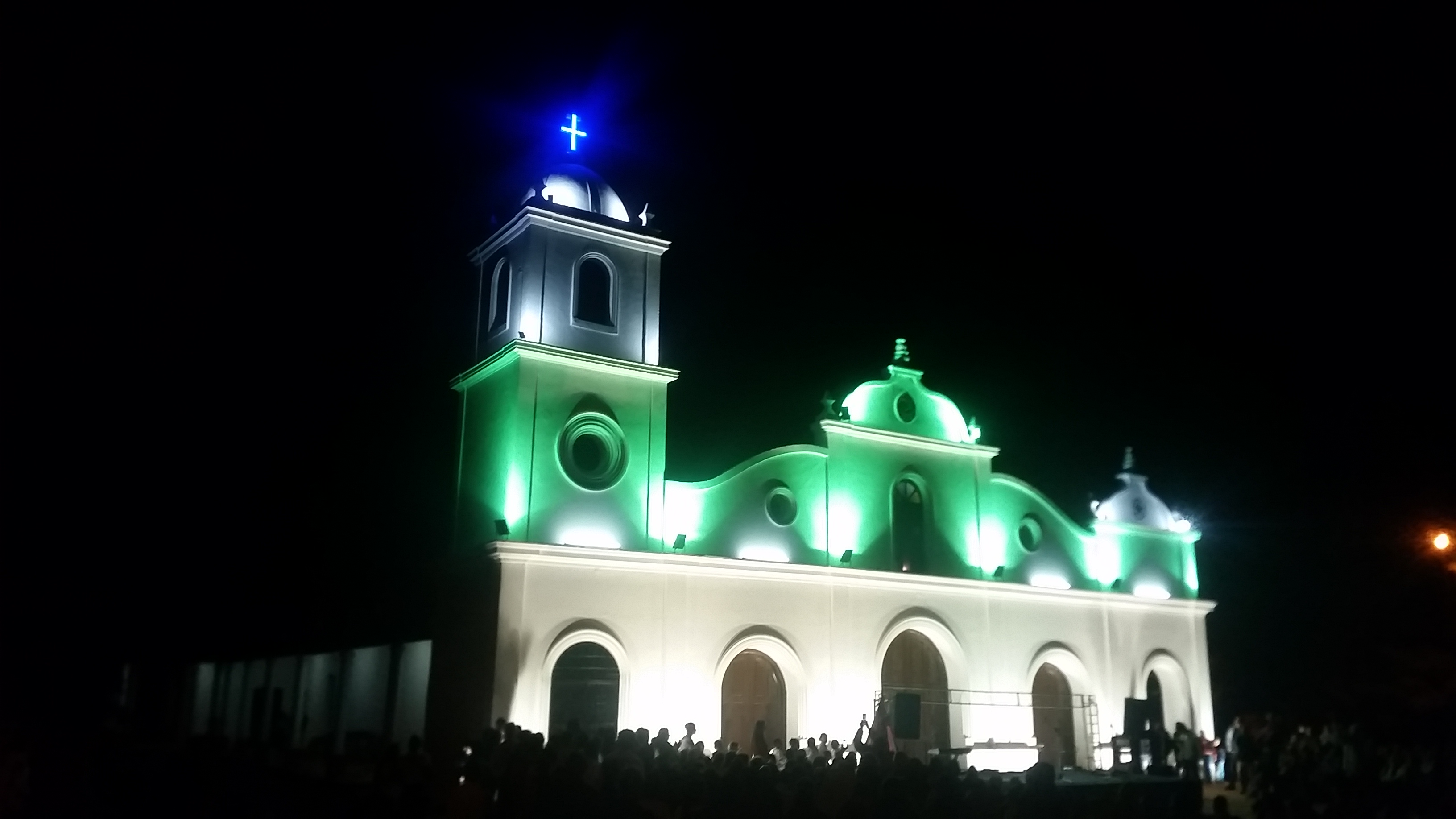 Inauguración de luces